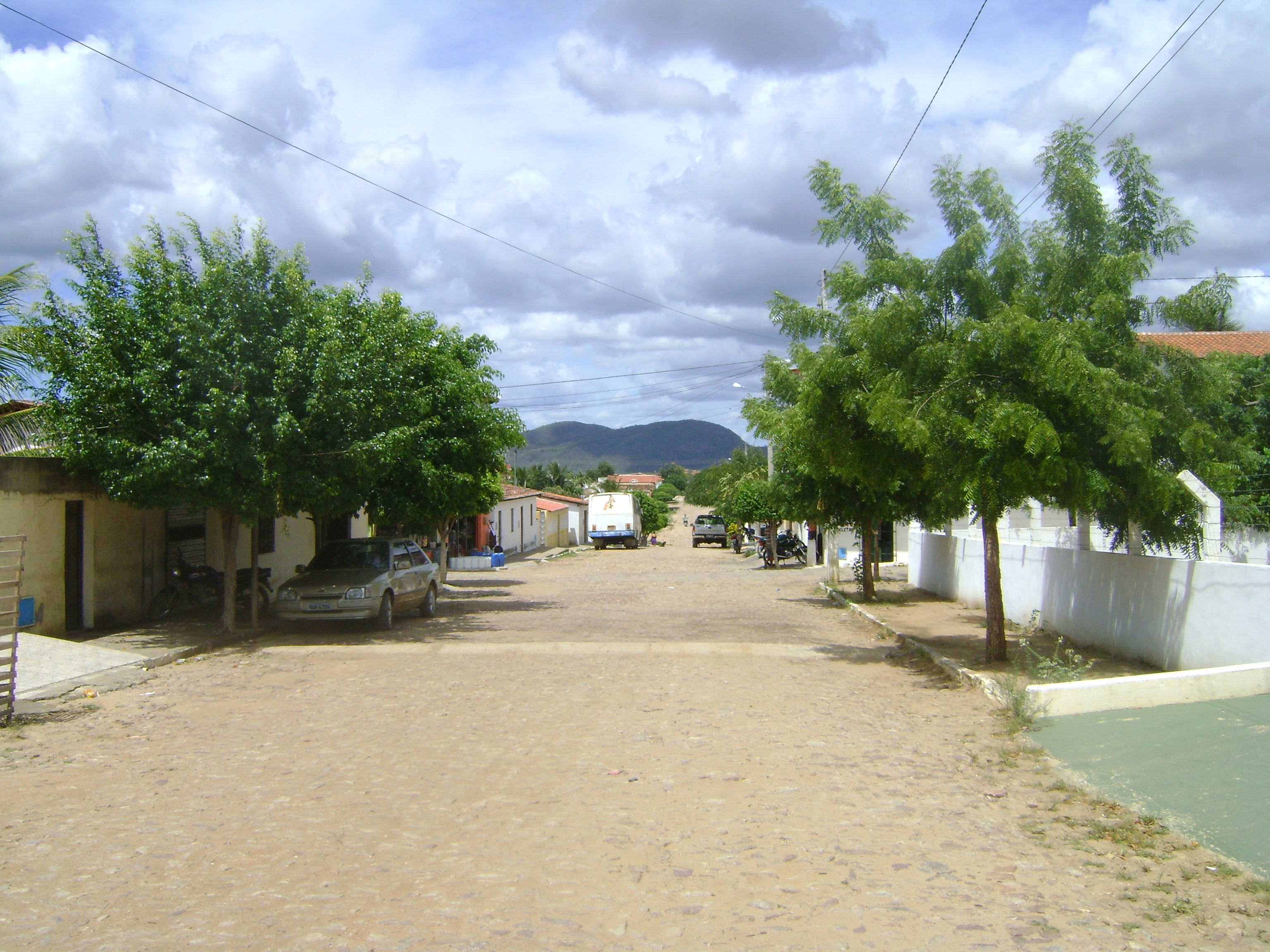 Serrote São Joaquim vista em Lagoa do Mato, Itatira, Ceará - Brasil